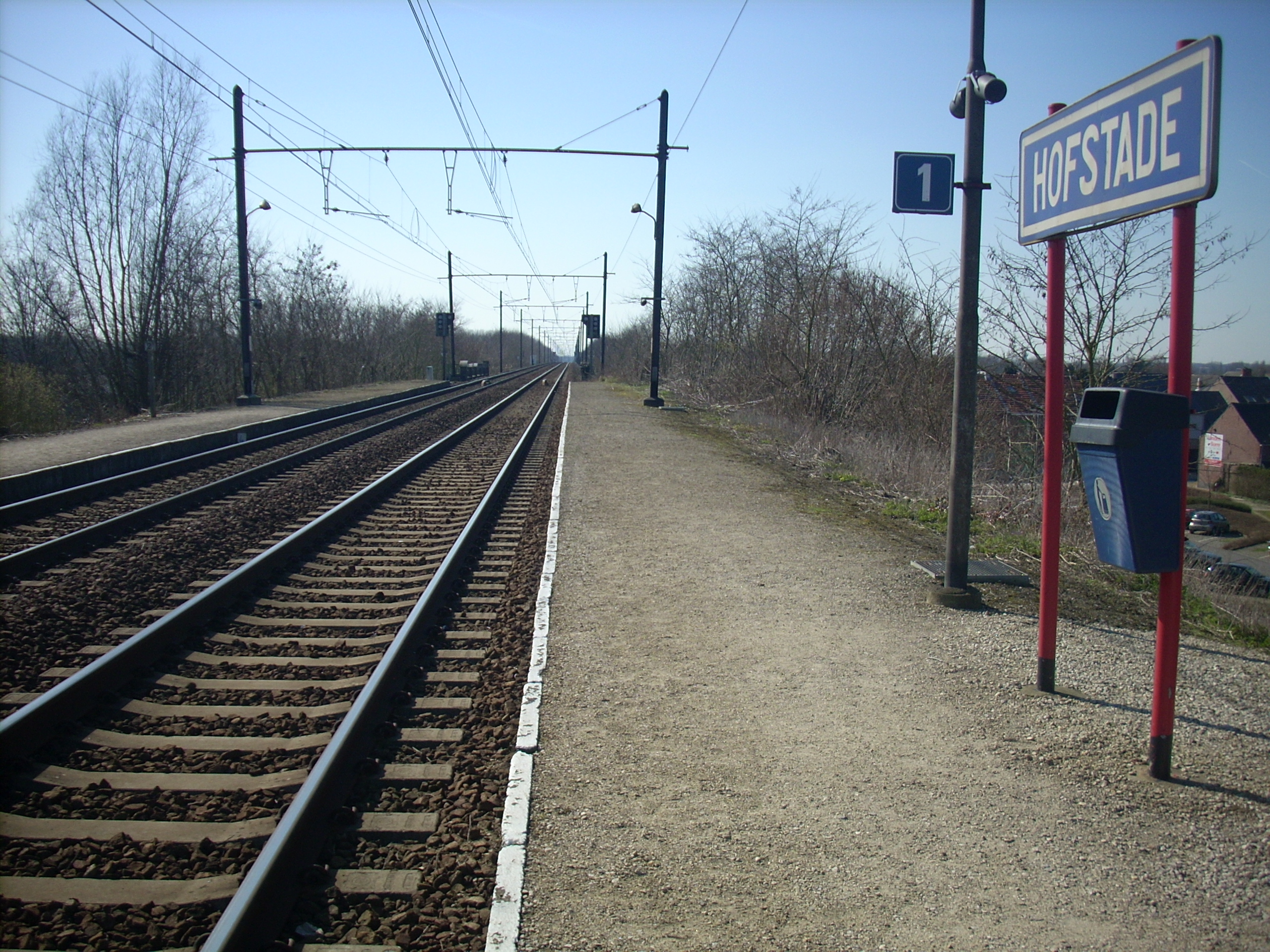 Treinstation van Hofstade